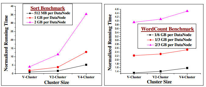 Cluster physique vs cluster machine virtuelle